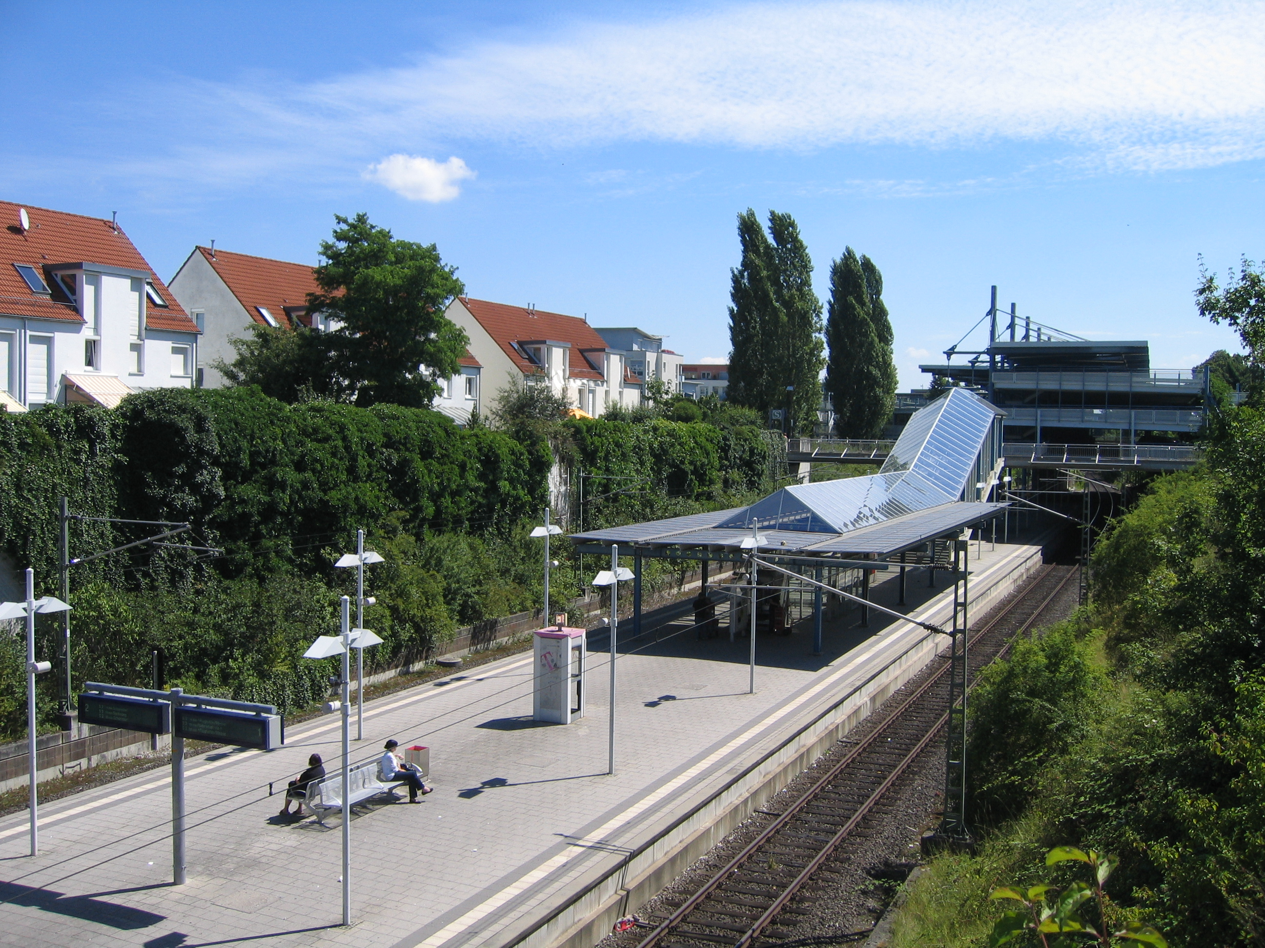 Haltepunkt Echterdingen